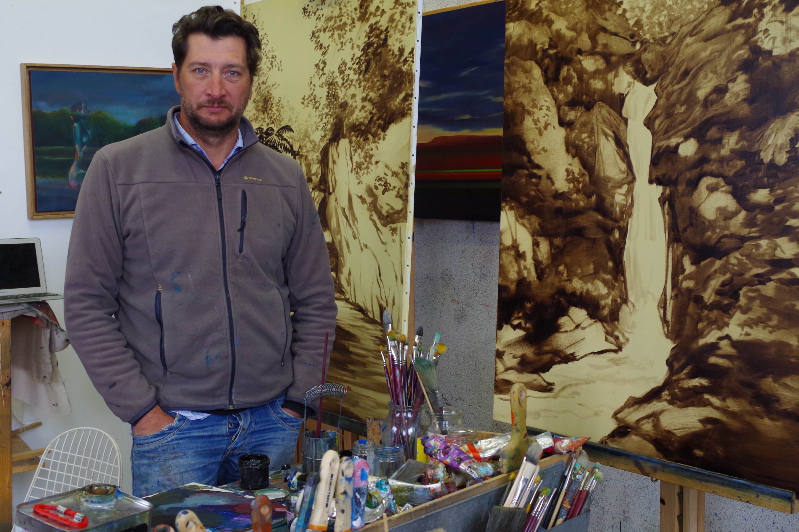 Olivier Masmonteil photographié dans son atelier rue des Entrepôts à Saint Ouen -Mars 2019 photo Frédéric Elin